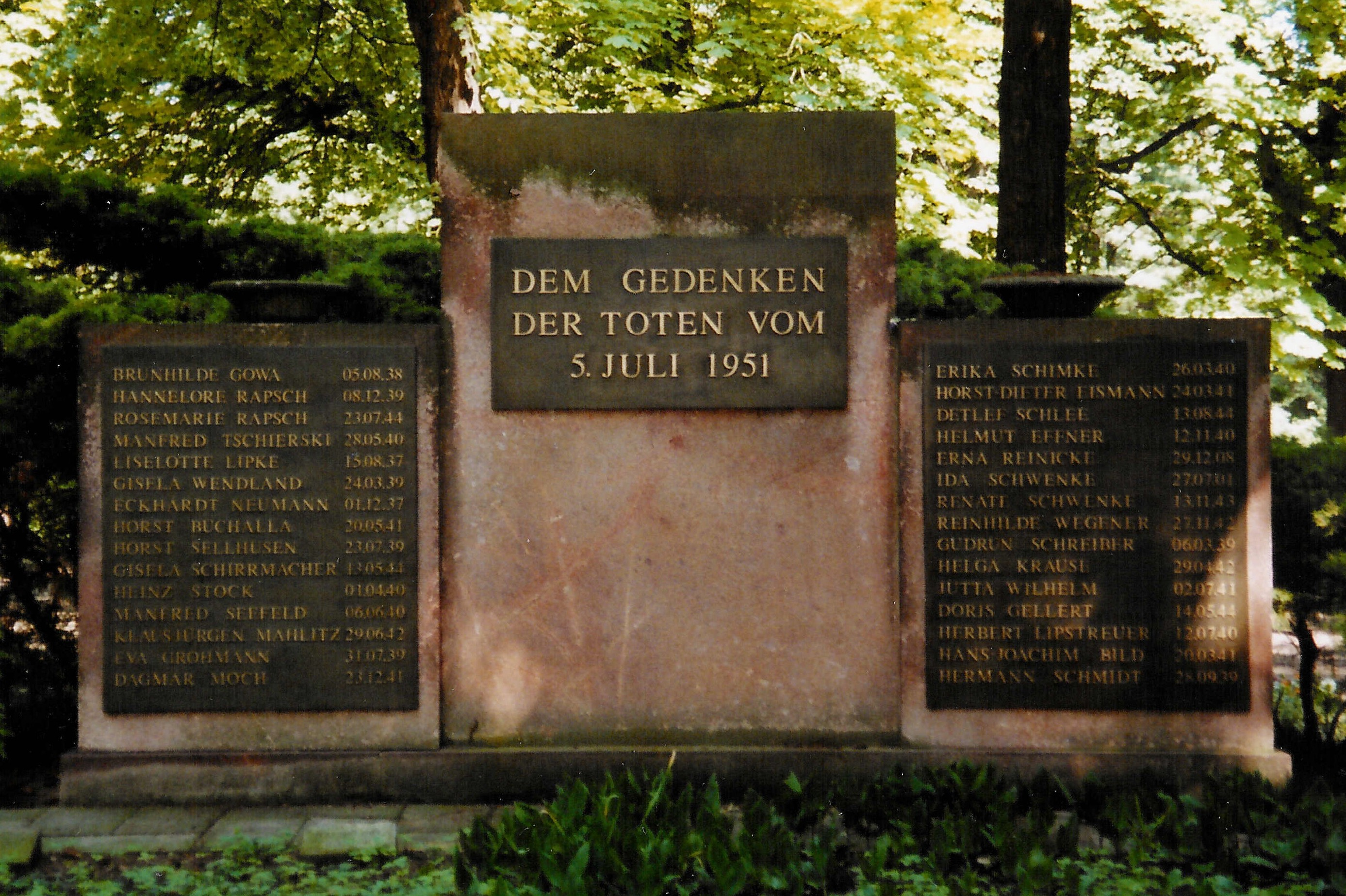 Gedenkstätte für die Opfer des Schiffsunglücks auf dem Fahrgastschiff „Heimatland“, bei dem am 5. Juli 1951 nach offiziellen Angaben 28 Kinder und zwei Betreuer am Treptower Hafen von Berlin ihr Leben verloren. Die Gedenkstätte befindet sich auf dem Berliner Zentralfriedhof Friedrichsfelde in dem Abschnitt zwischen Pergolenweg und Ahornallee. Vor den drei Gedenktafeln erstreckt sich eine dazugehörige Gräberanlage mit 16 kleinen Grabsteinen.